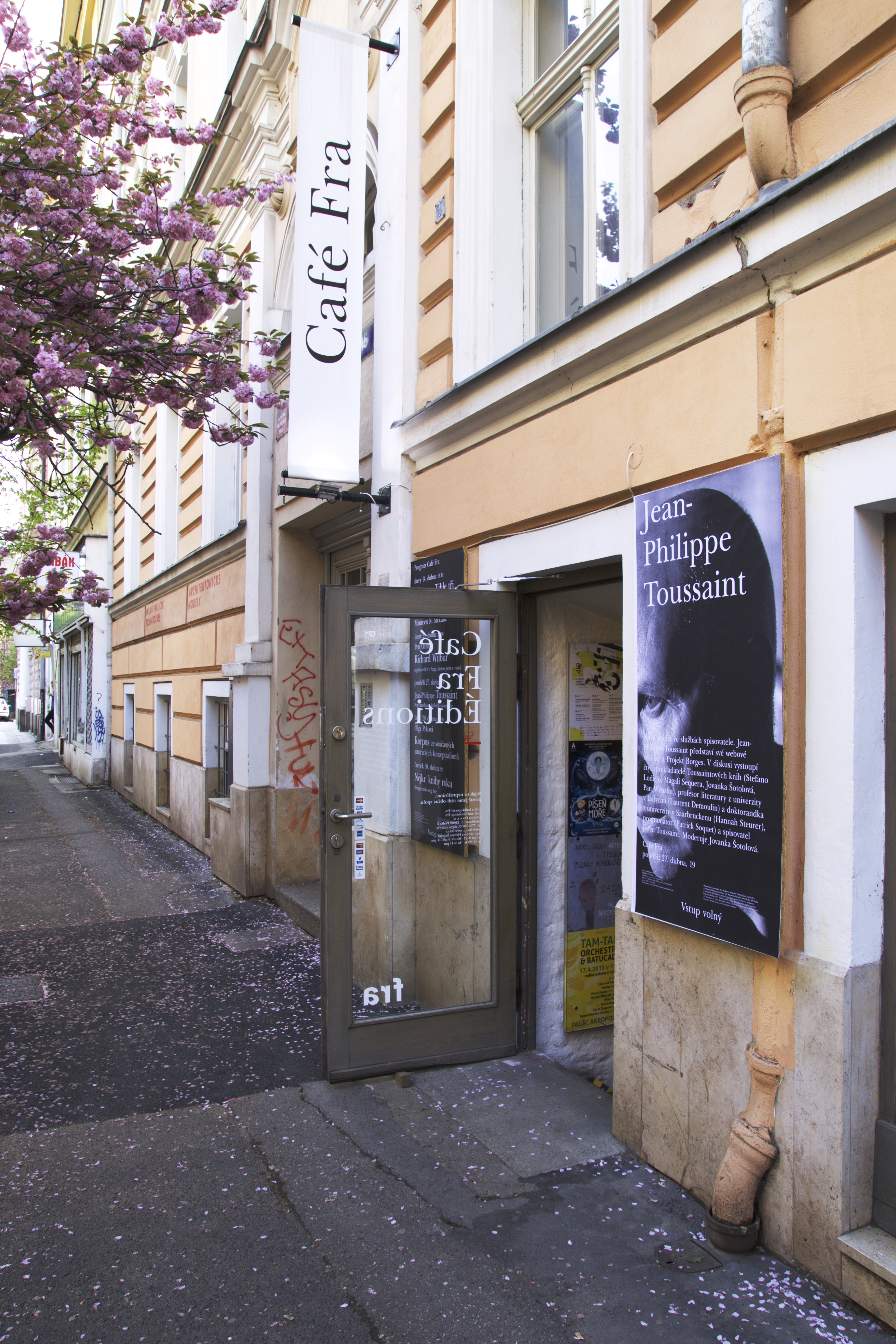 Café Fra, Praha, Šafaříkova 202/15.